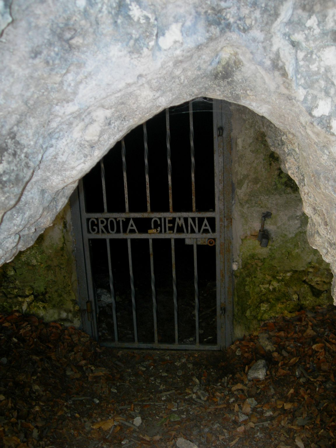 Wejście do Groty Ciemnej, Ojcowski Park Narodowy, Polska